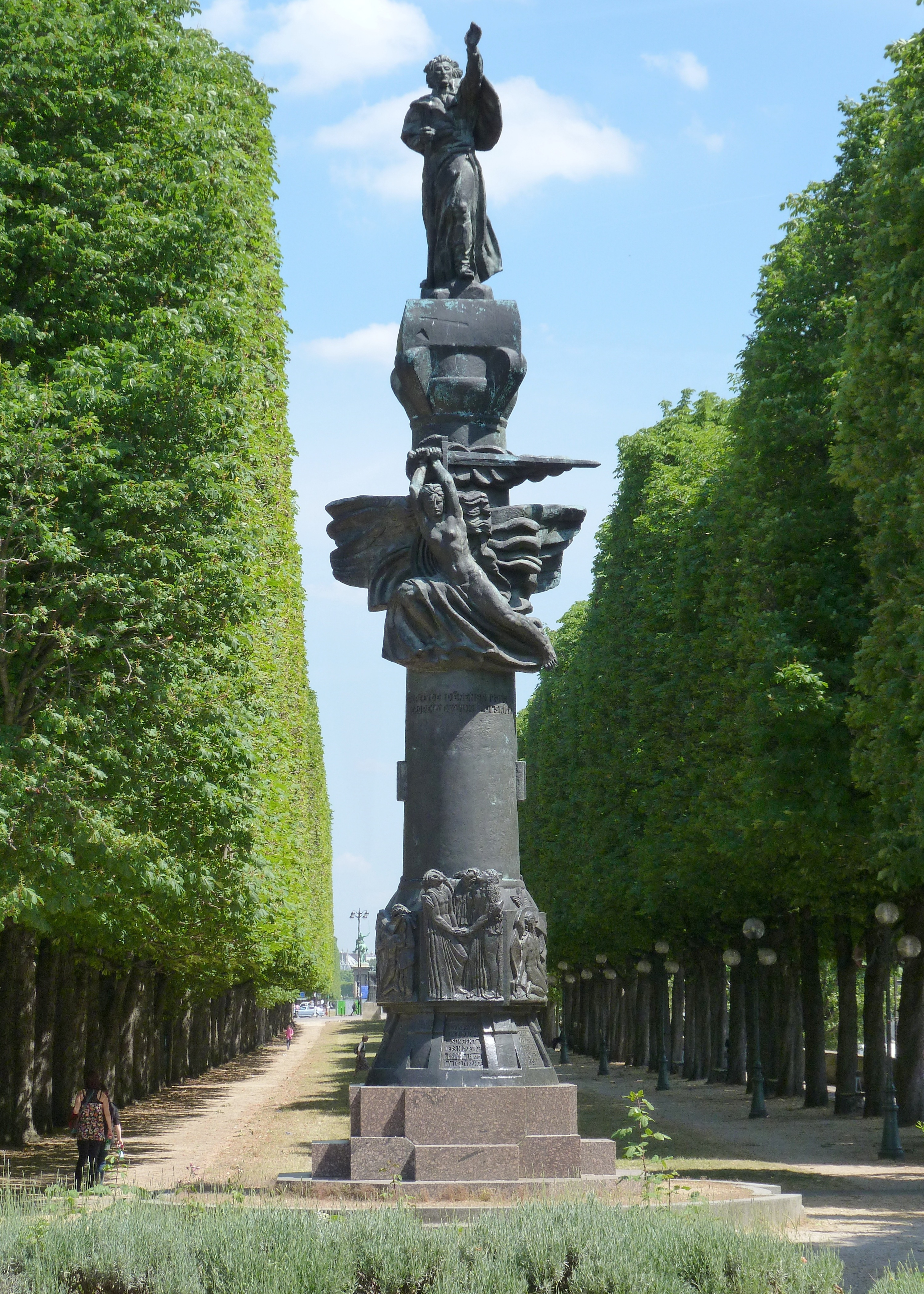 Monument à Mickiewicz par Antoine Bourdelle (1929), Cours Albert-Ier (Jardin d'Erevan, Paris 8e arrond.). Vue générale.